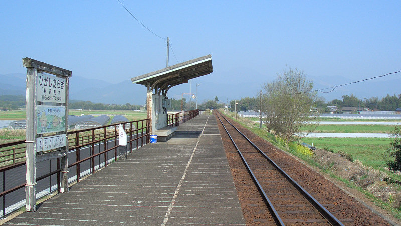 くま川鉄道湯前線ja:東多良木駅 ホーム 写真手前がja:人吉駅方面。 撮影者/著者/著作権保有者 : MK Products (本人がアップロード) 撮影日 : 2007/03/30 東多良木駅用にアップロードした画像です。良い画像があれば別の画像に変えてください。